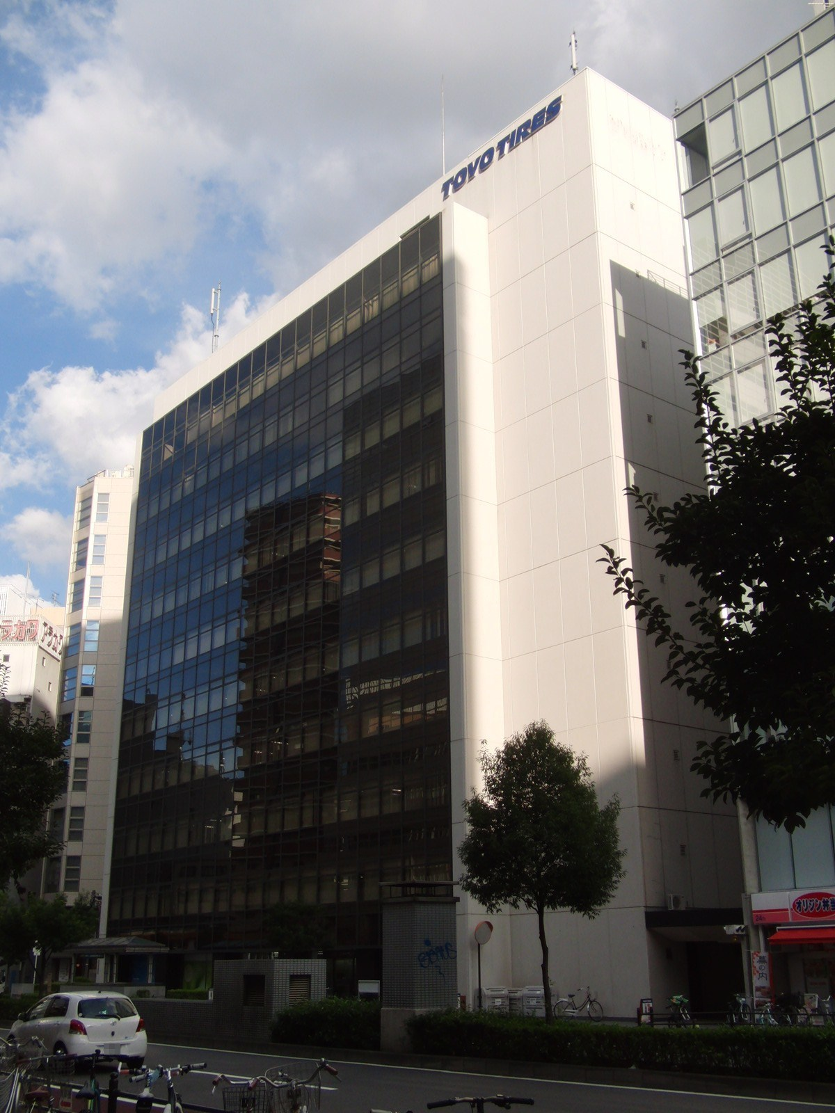 著作権者である私はこの画像における権利を放棄いたします。